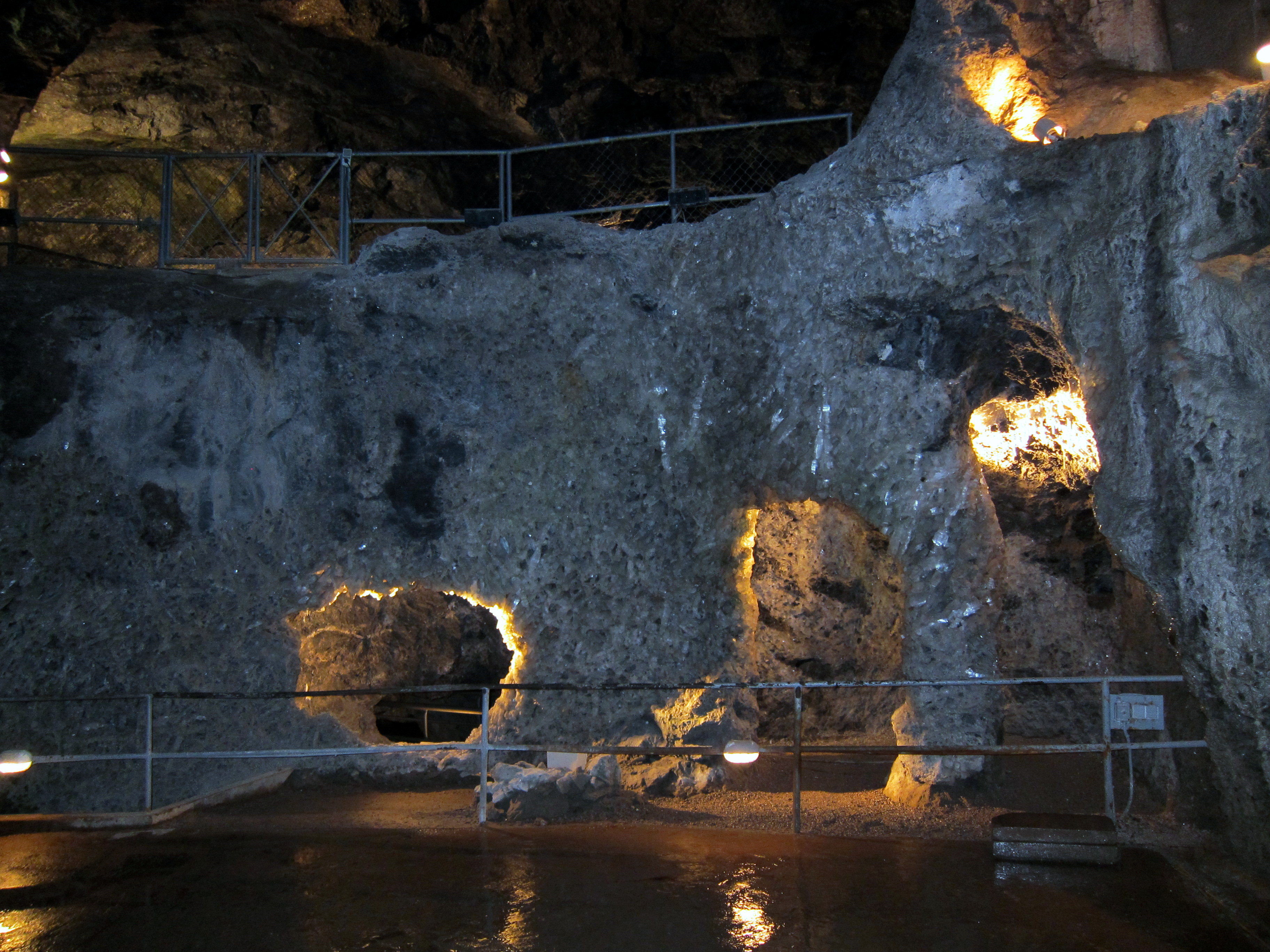 Marienglashöhle